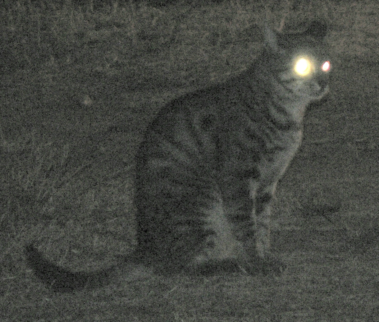 cat retina (tapetum lucidum) reflection, Cargèse, Corsica